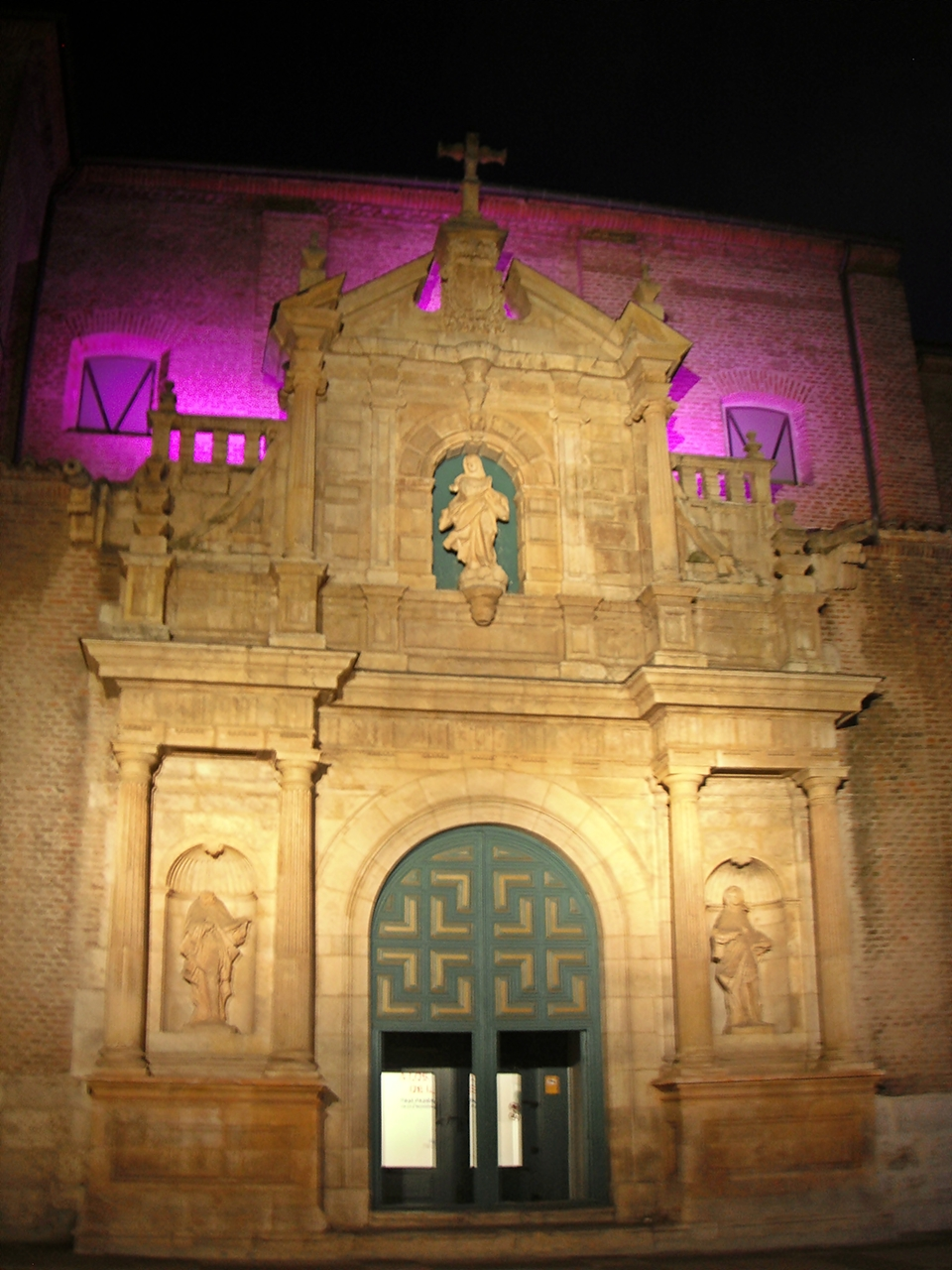 Convento de las Comendadoras de Santa Cruz Convento de Dominicas Franciscanas en Valladolid en toma nocturna en septiembre de 2012